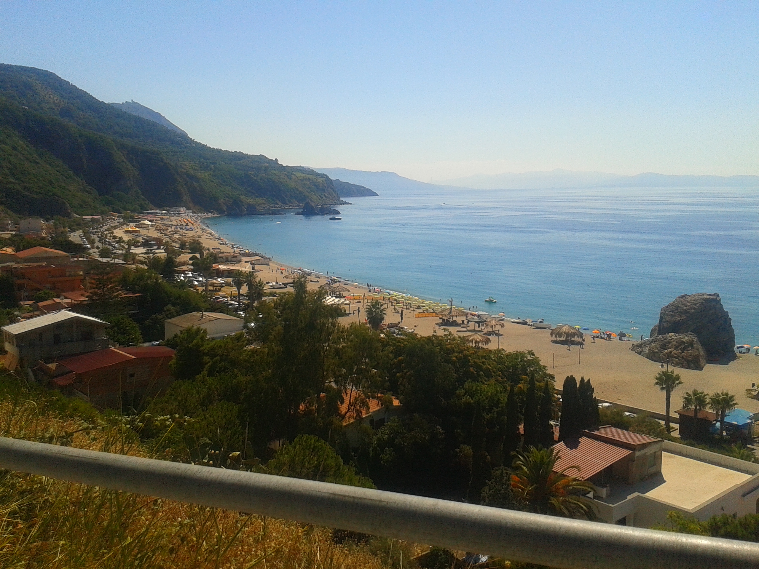 Vista della spiaggia della Tonnara di Palmi, fotografata dalla via del Mare.